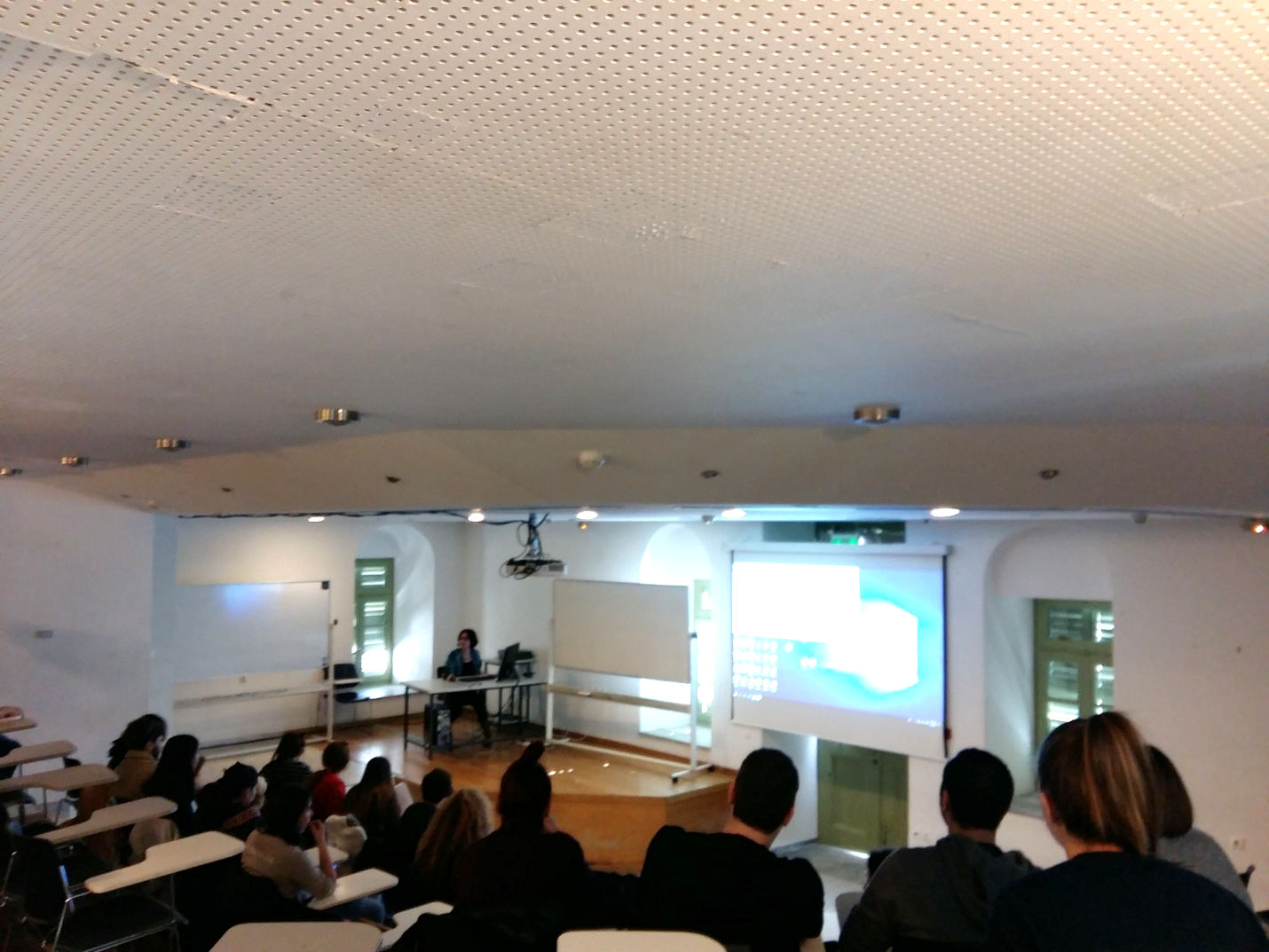 Στην αίθουσα του αμφιθεάτρου πραγματοποιούνται διαλέξεις μαθημάτων, ανοιχτές παρουσιάσεις διπλωματικών εργασίων, συνελέυσεις του φοιτητικού συλλόγου, και πολιτιστικά δρόμενα των πολιτιστικών ομάδων του τμήματος.